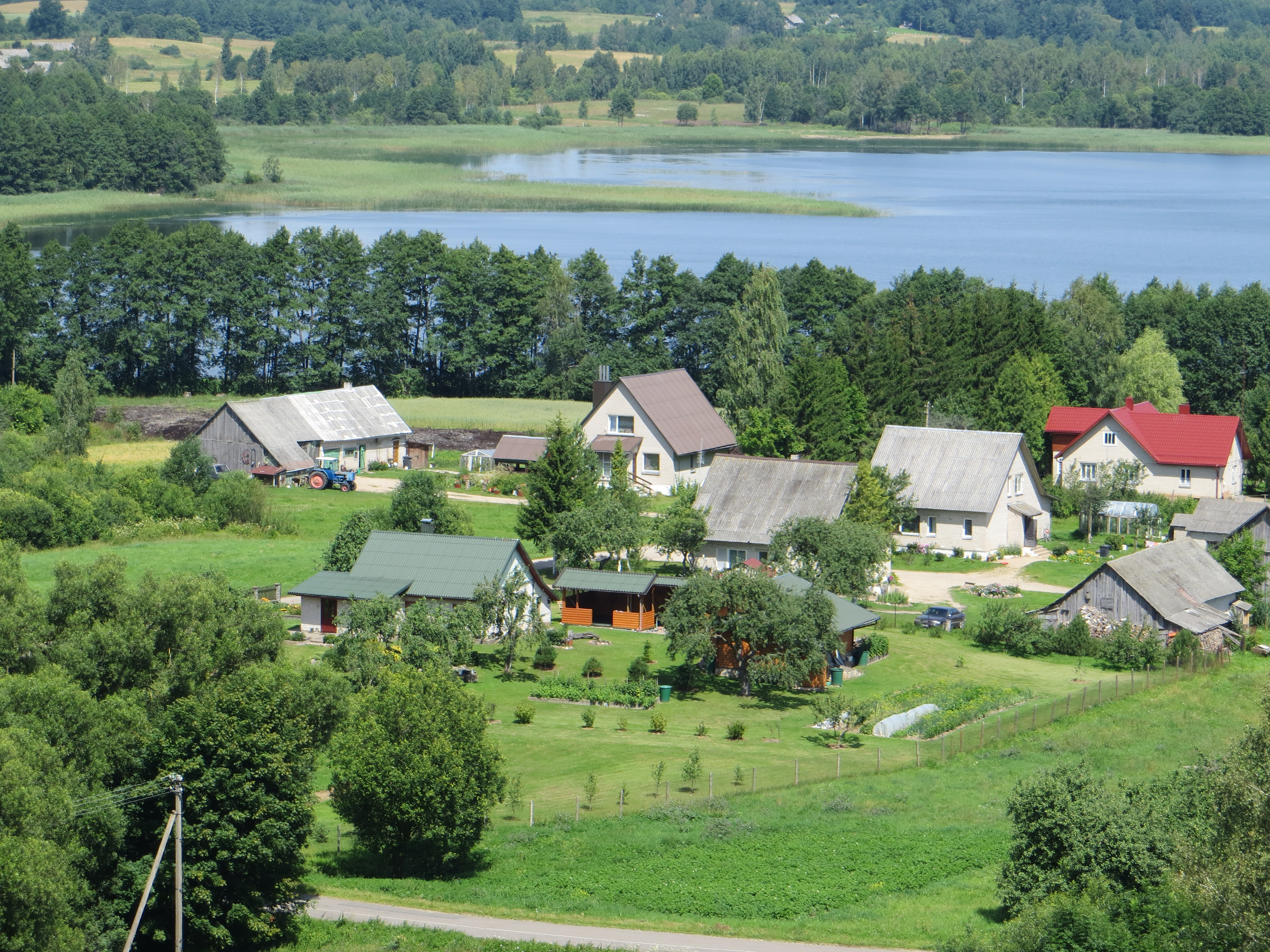 Miežonys, Lithuania